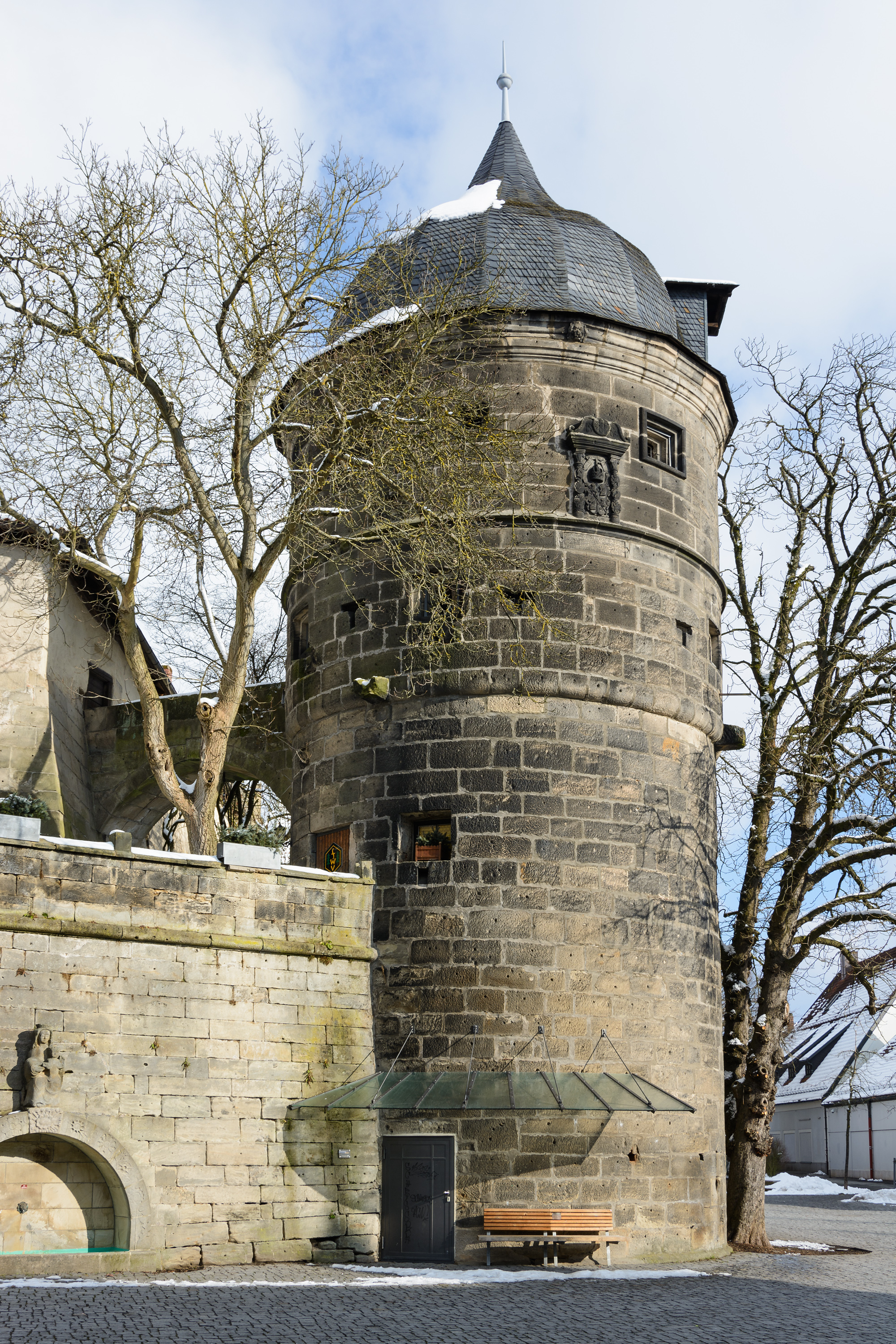 Der Rosenturm in Kronach von Südwesten.